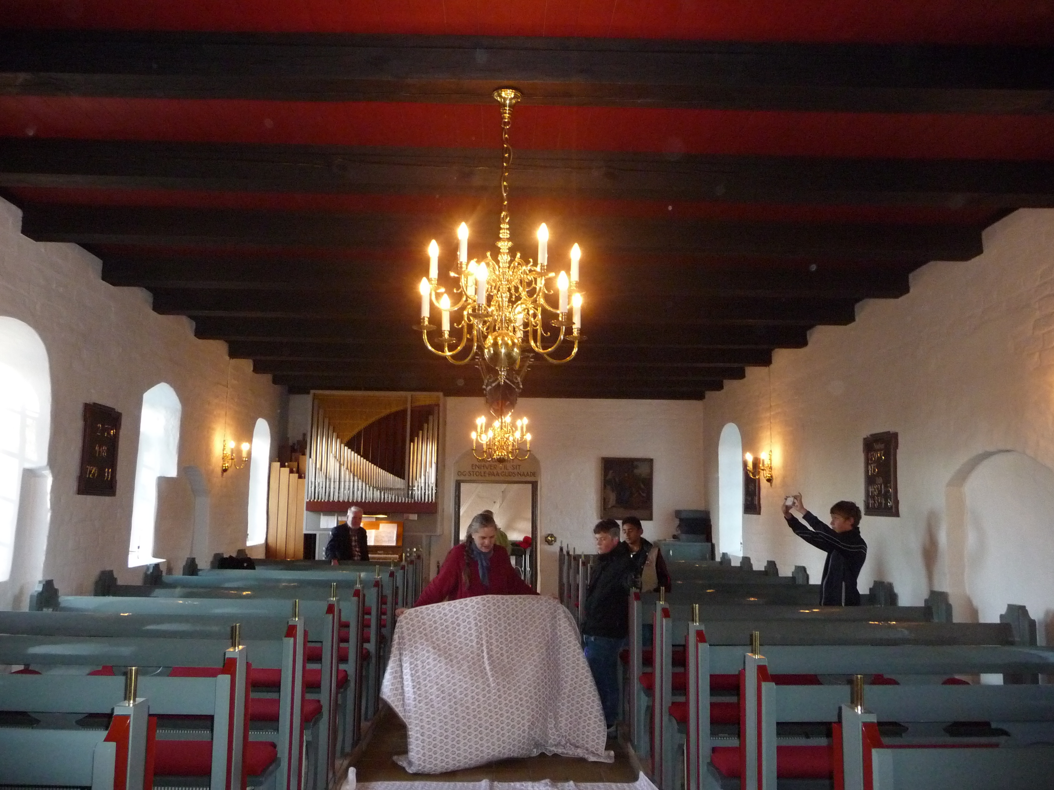 skibet inde i seden kirke